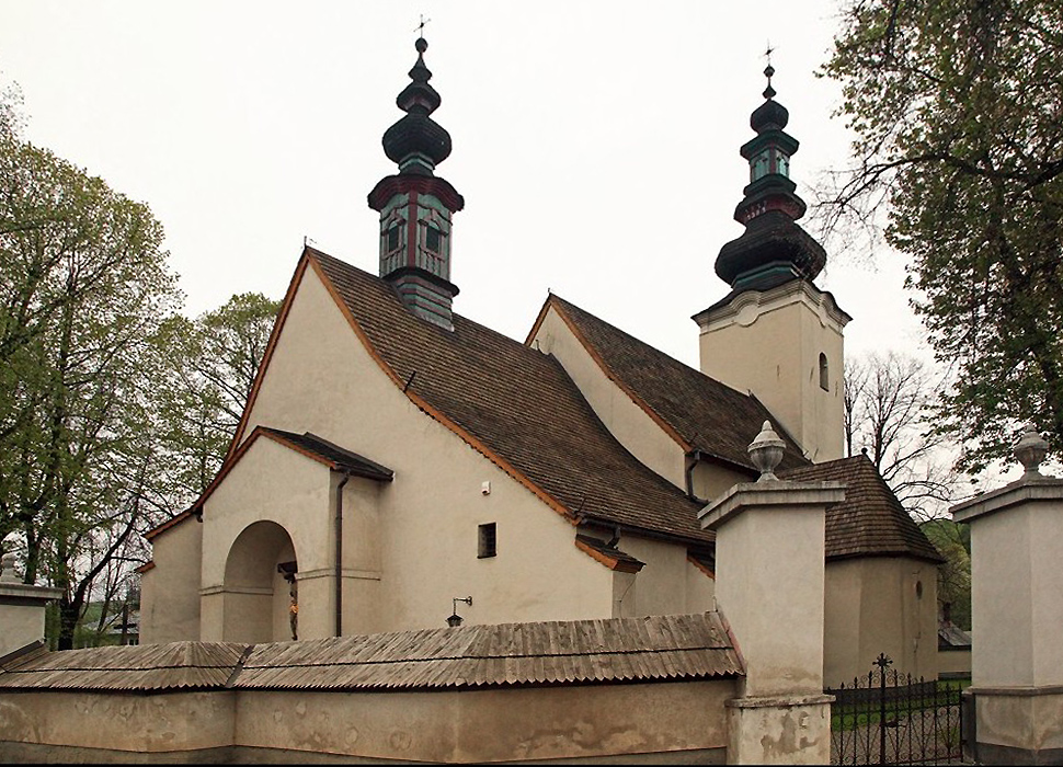 Kacwin. Kościół Wszystkich Świętych